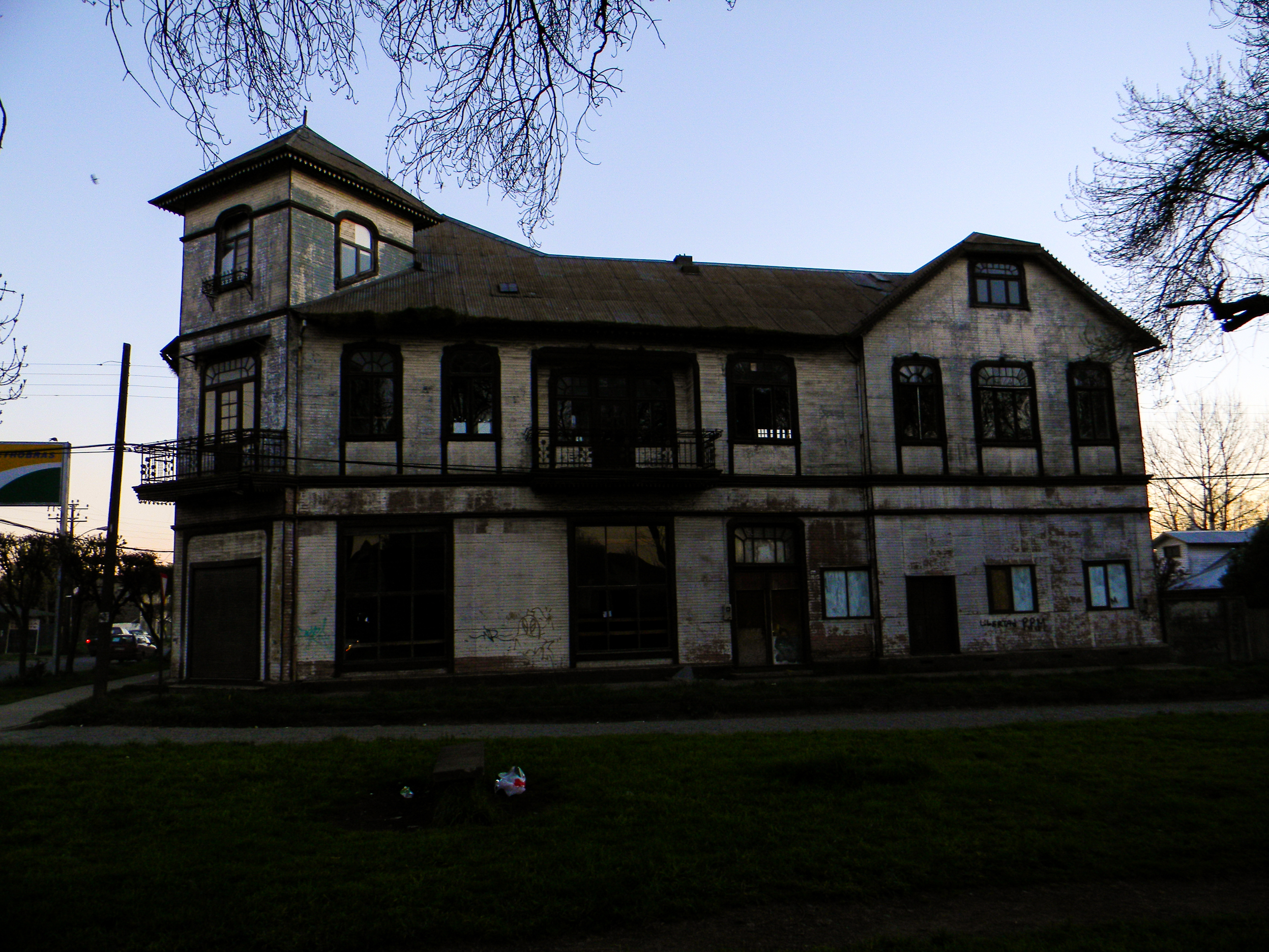 Casa Marchmar (Ex Casa Daniel) This is a photo of a national monument in Chile: 2221